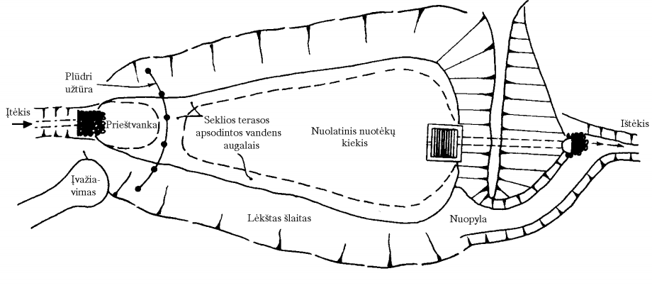 Schema